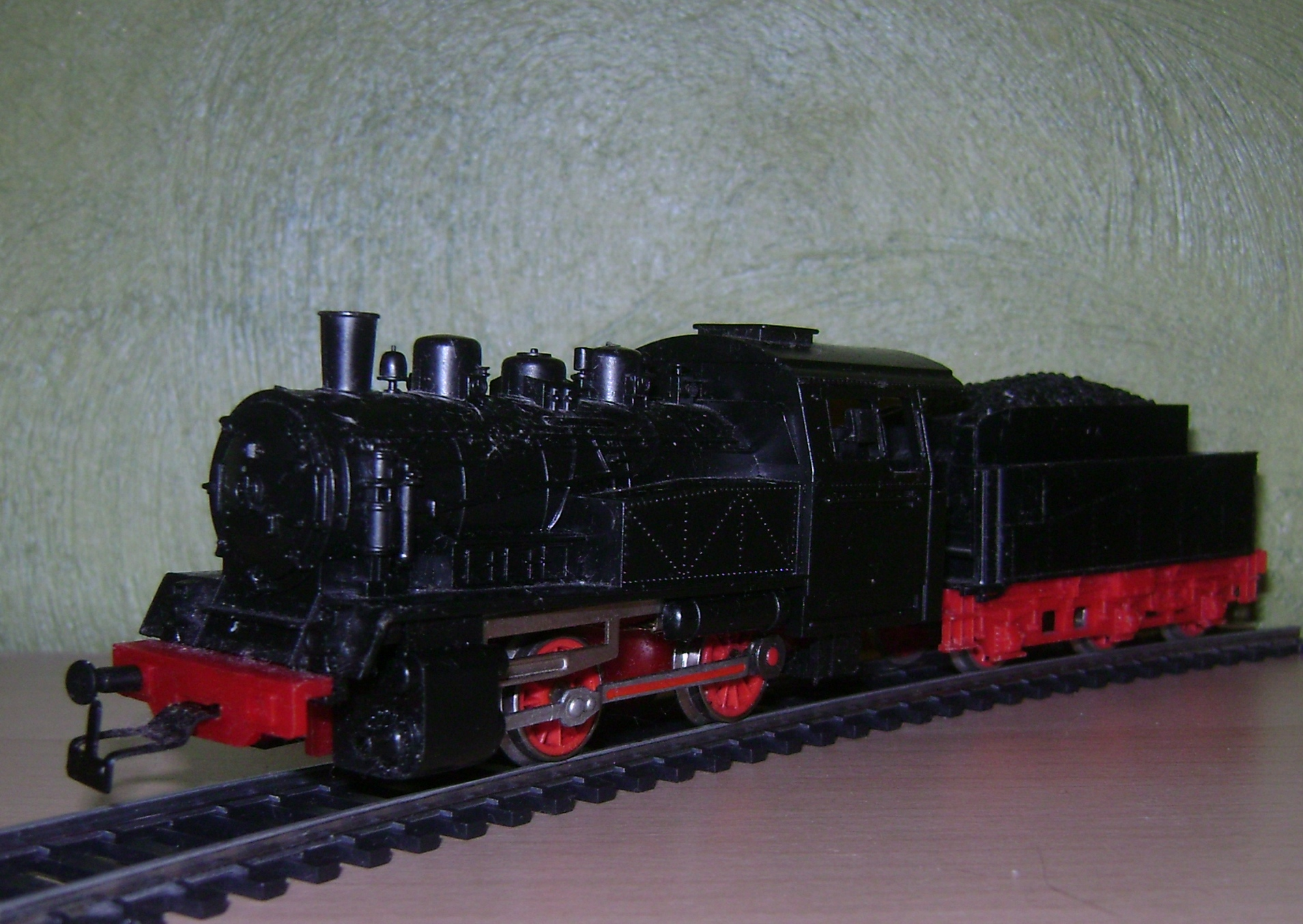 Model 98 003 wyprodukowany przez Piko